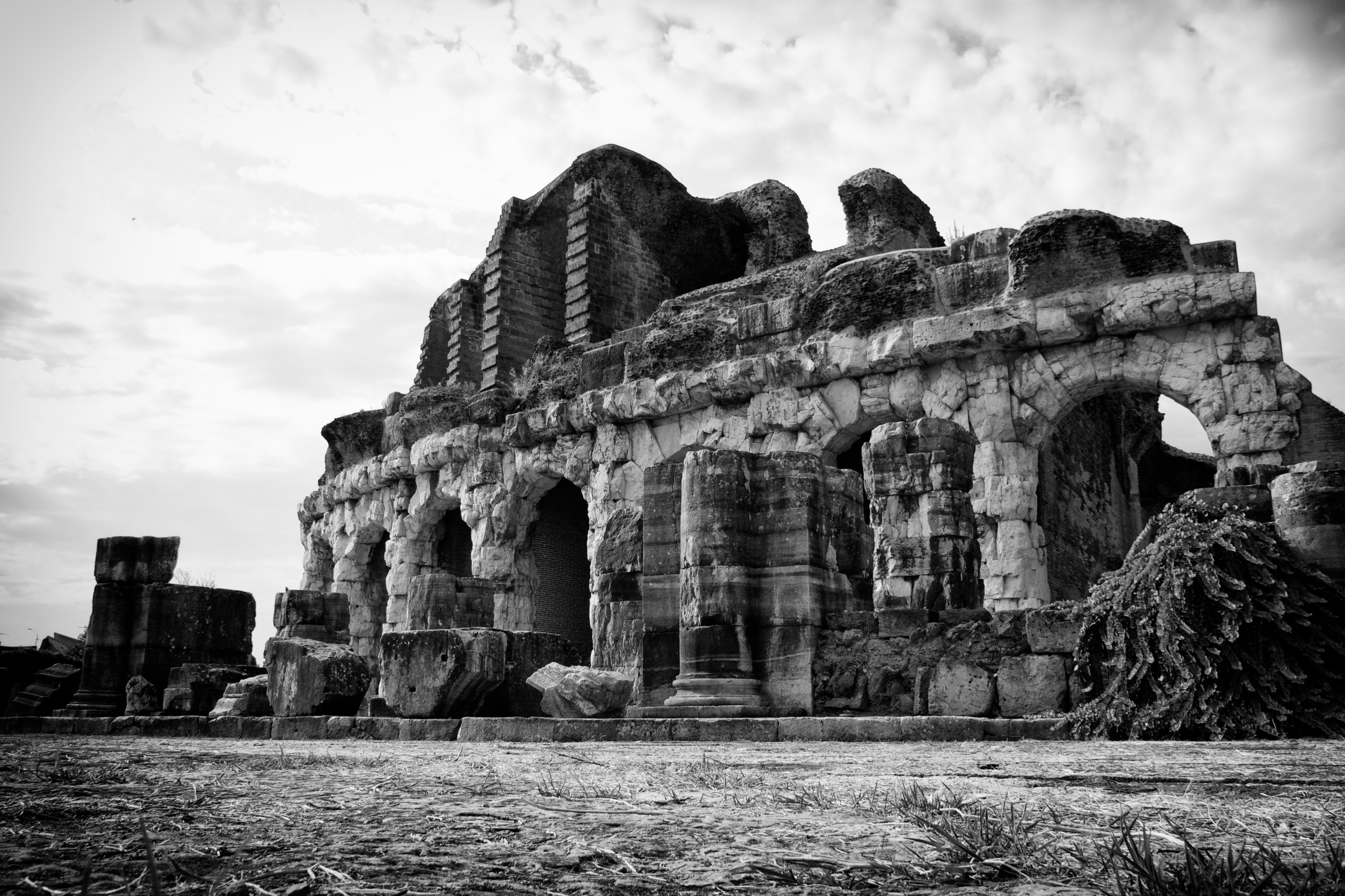 Anfiteatro Campano dell'Antica Capua This is a photo of a monument which is part of cultural heritage of Italy.